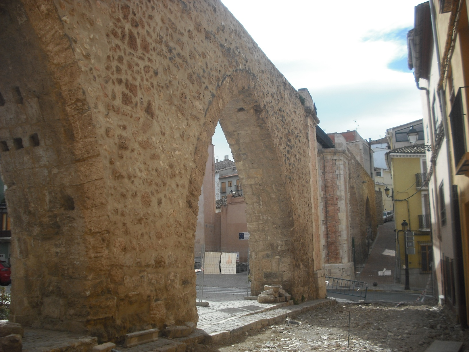 Vista de l'aqüeducte Sogorb.